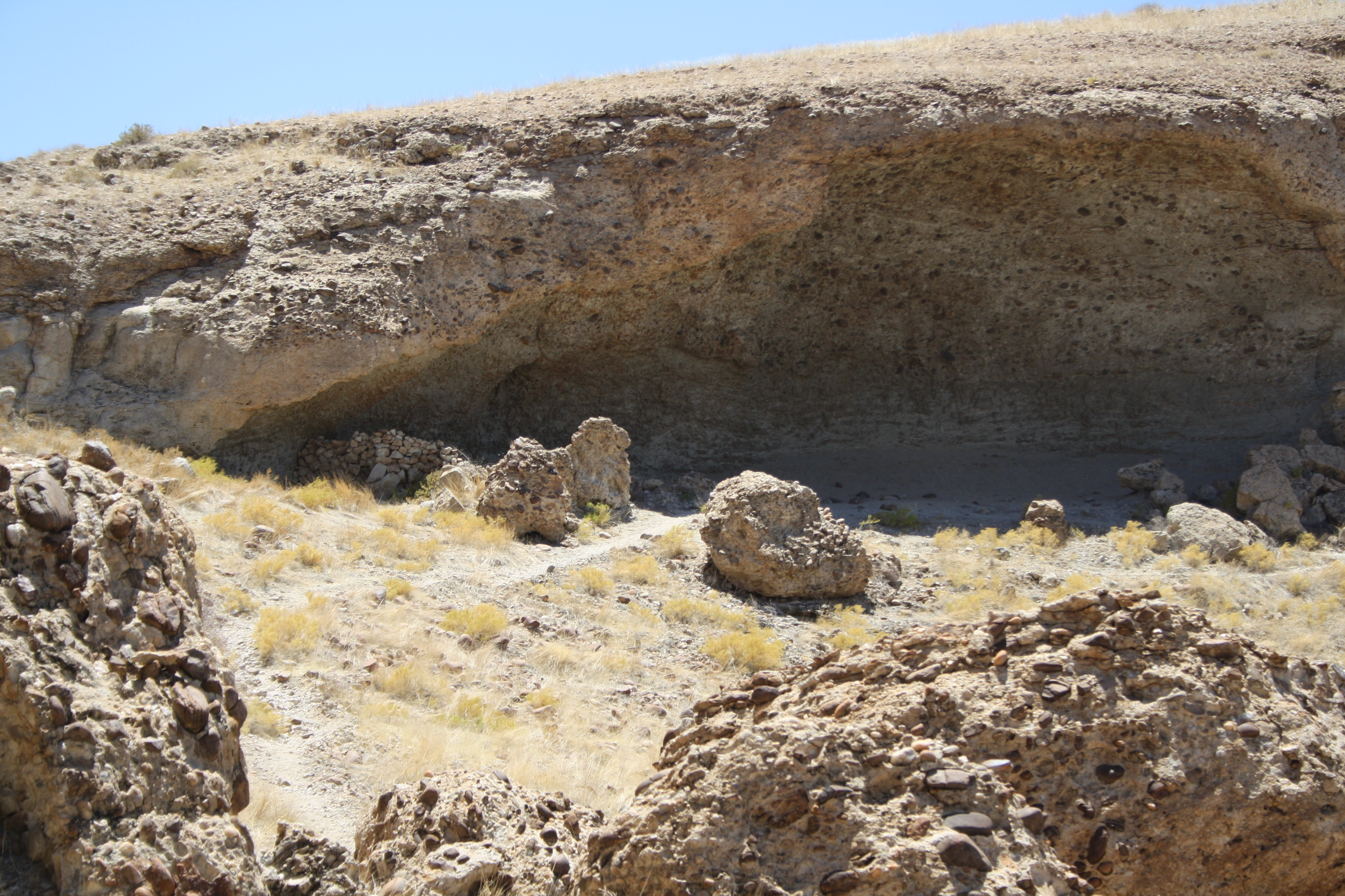 Die Reste des Unterstandes von Henno Martin, Hermann Korn und Otto im Kuiseb Canyon